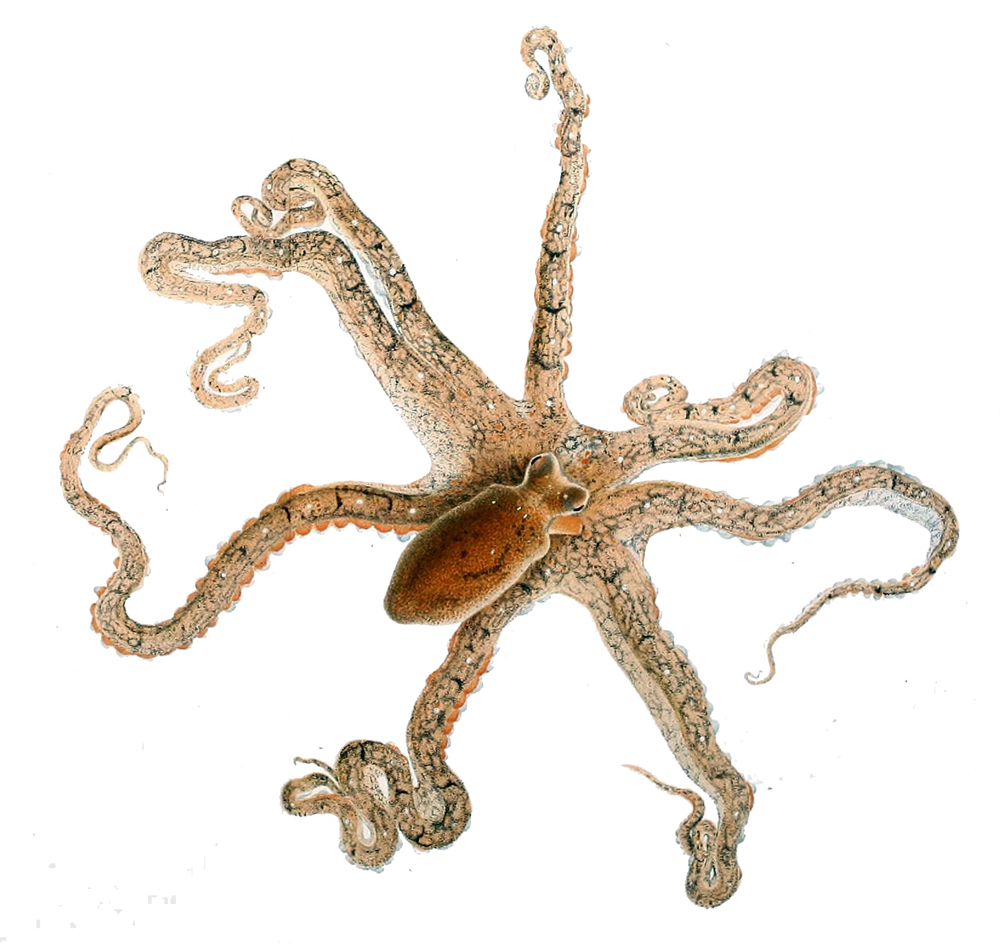 Macrotritopus defilippi (Vérany, 1851) (synonym: Octopus defilippi Vérany, 1851)